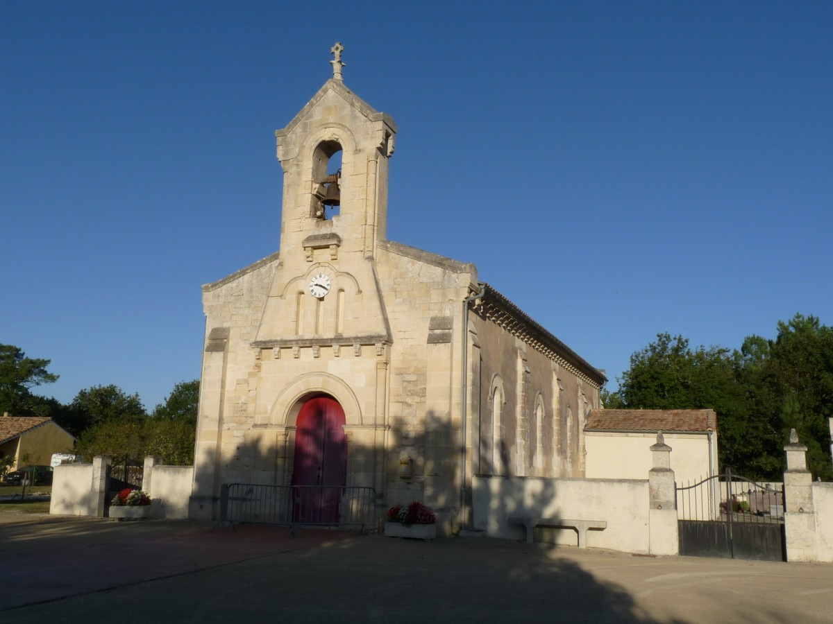 chapelle de l'Hôpital, Grayan-et-l'Hôpital, Gironde, France